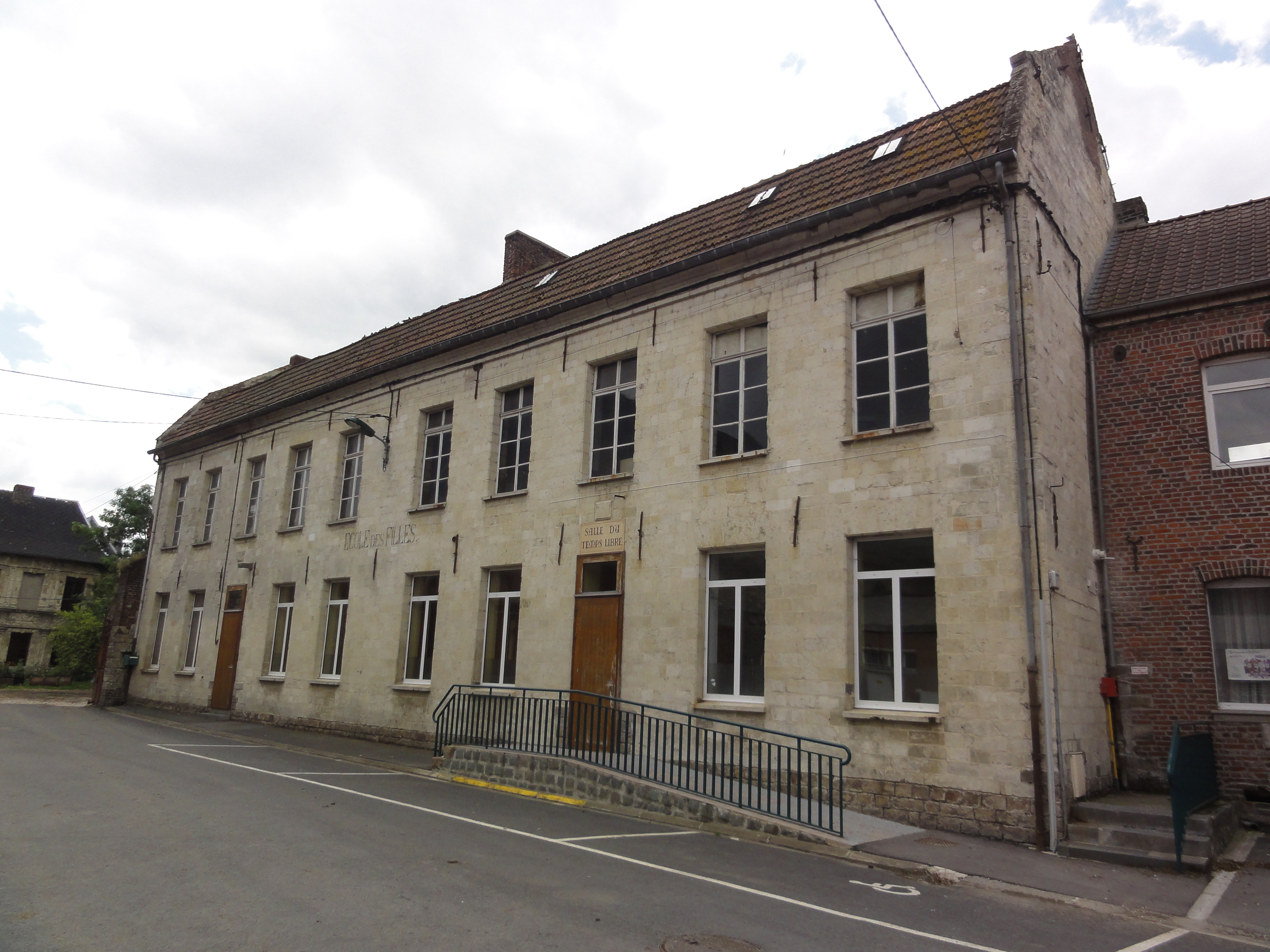 Haspres (Nord, Fr) Salle du temps libre